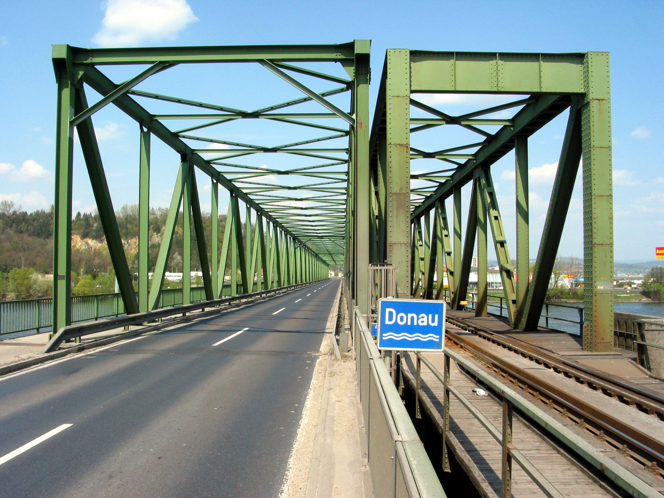 Straßen- und Eisenbahnbrücke über die Donau bei Mauthausen